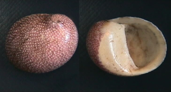 Neritina puncticulata del río Chuspa, Estado Mirada - Venezuela